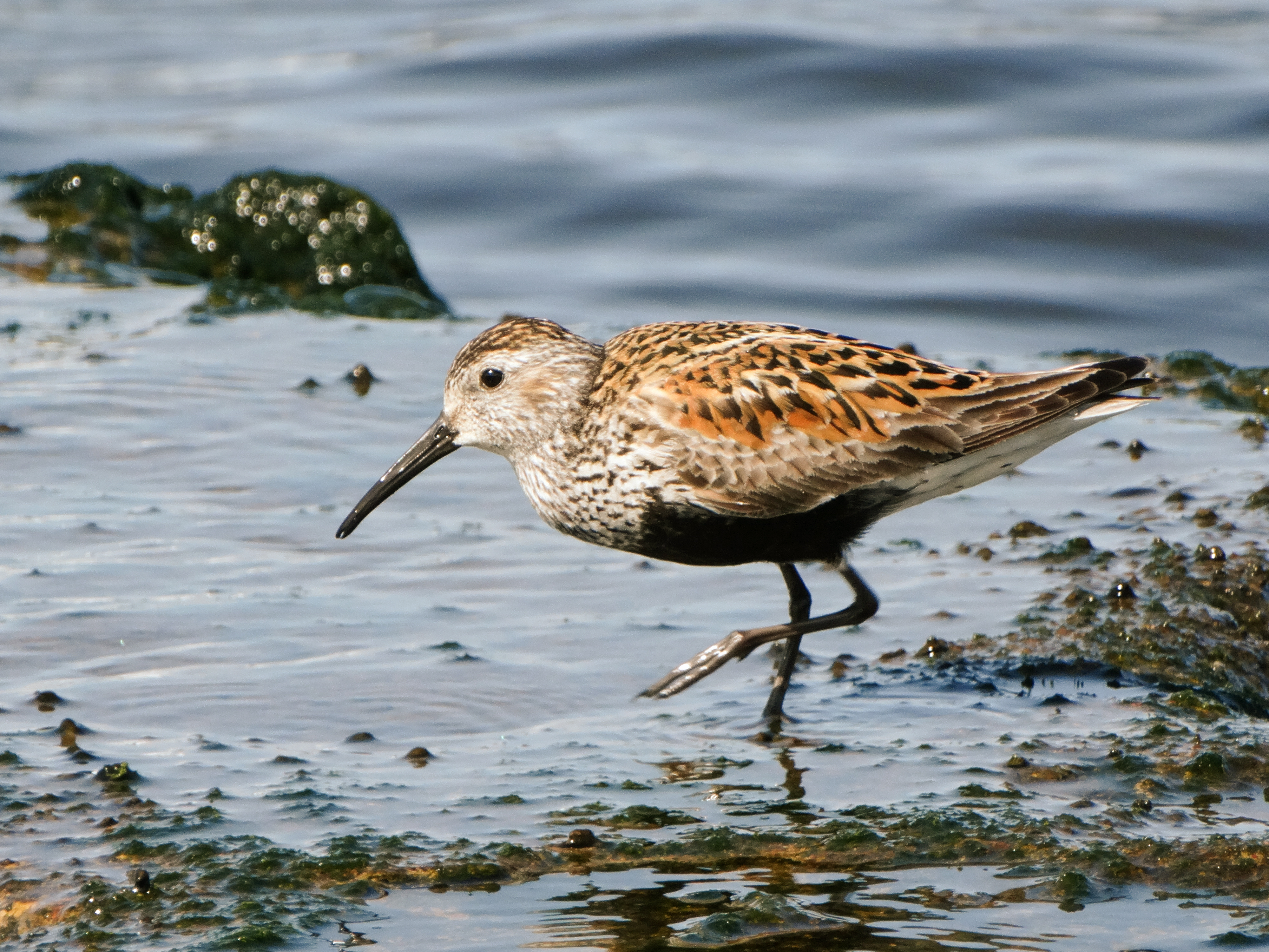 Calidris alpina alpina, adult summer plumage on autumn migration, Daugavgrīva, Riga, Latvia.